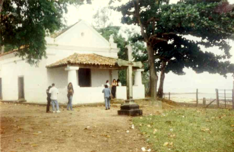 Capela da Luz